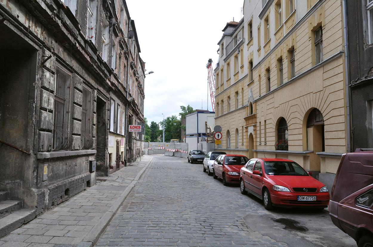 Ulica Rydygiera w pobliżu Drobnera. Perspektywa tej ulicy zostanie wkrótce zamknięta nowym budynkiem, który powstaje przy ulicy Drobnera.